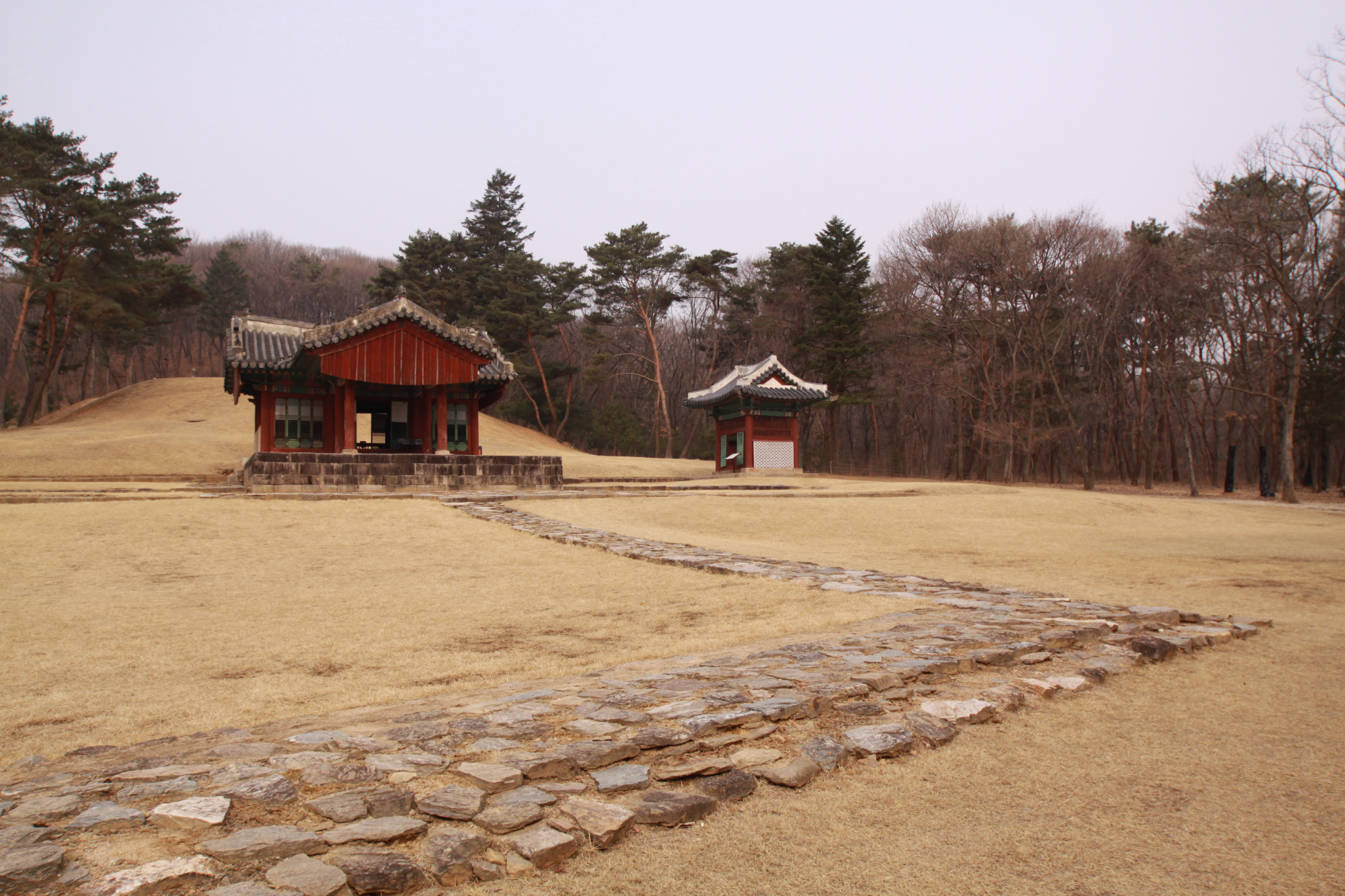 사적 제205호 파주 삼릉 (坡州 三陵)